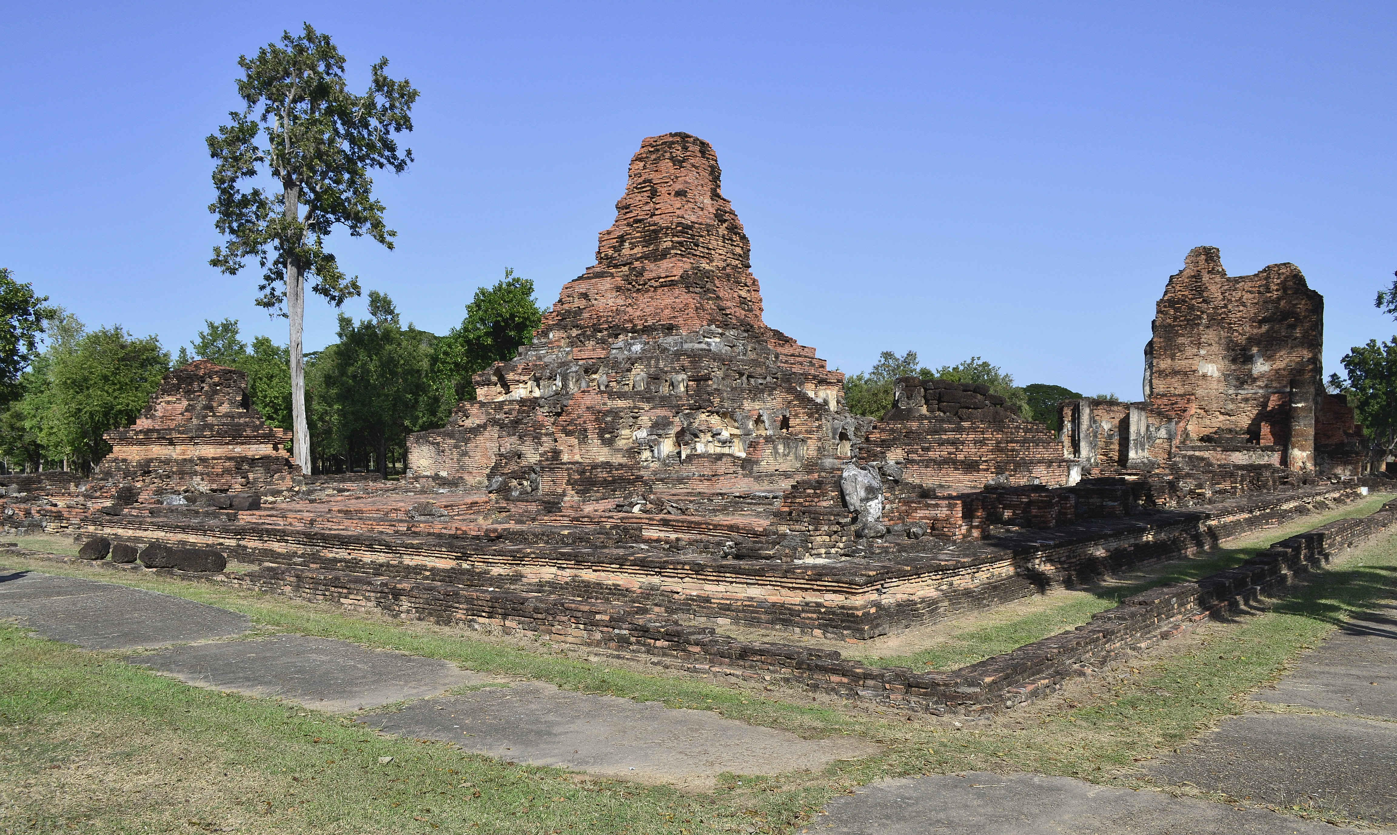 Wat Phra Phai Luang im Geschichtspark Sukhothai